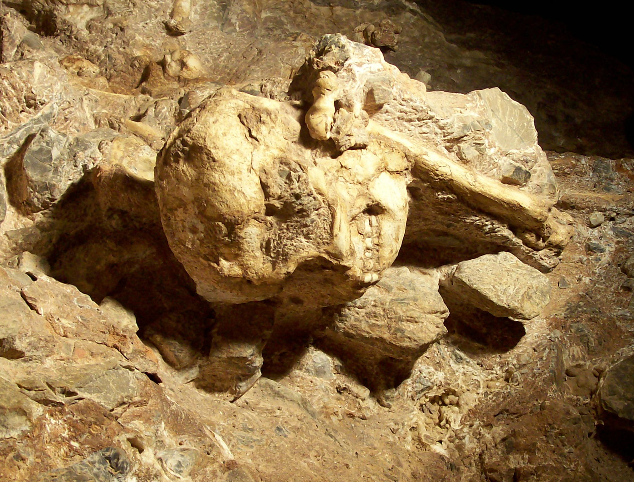 détail du crâne de Little Foot encore en place dans la grotte de Sterkfontein, novembre 2006